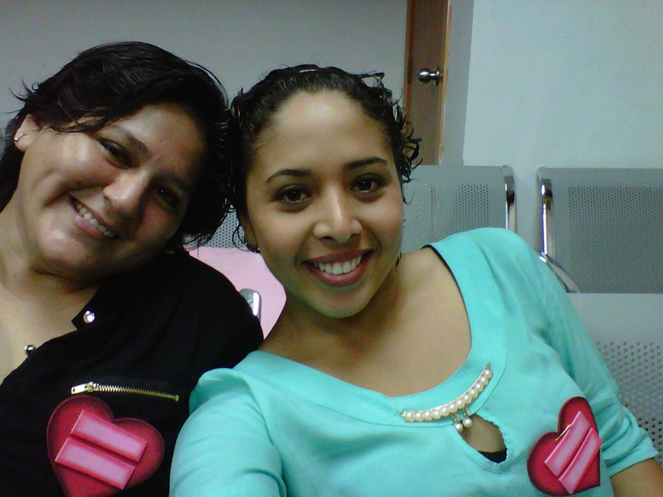 Previos Unión de hecho en Quito - Campaña Unión Civil Igualitaria Ecuador